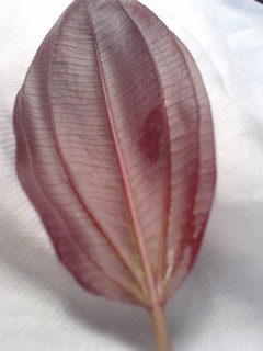 エキノドルスの改良種（アフレイム）。赤紫色の丸い葉を持つ。エキノドルスの葉の色、形、大きさは多様である。. Echinodorus aflame. Cultivated by Aquaflora in Nederland. The leaf cultivated in land. It is young leaf is winered color.